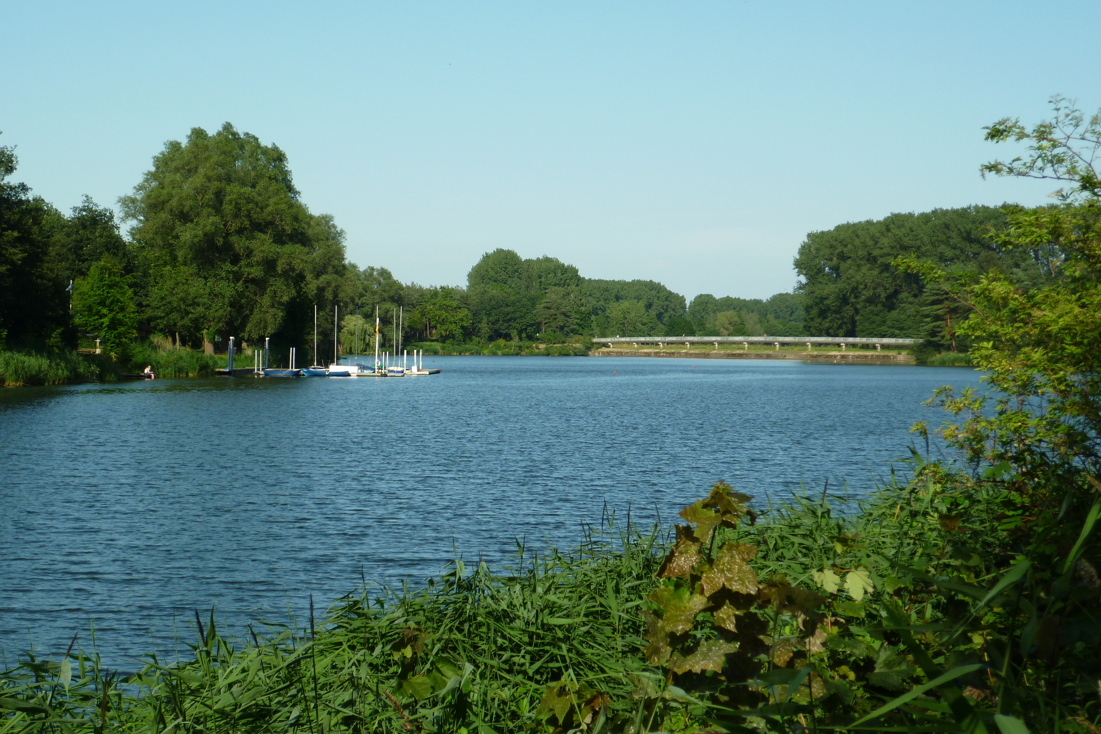 Warendorf. Der Emssee, im Hintergrund die Fußgängerbrücke als Trennung zum Fluss Ems.